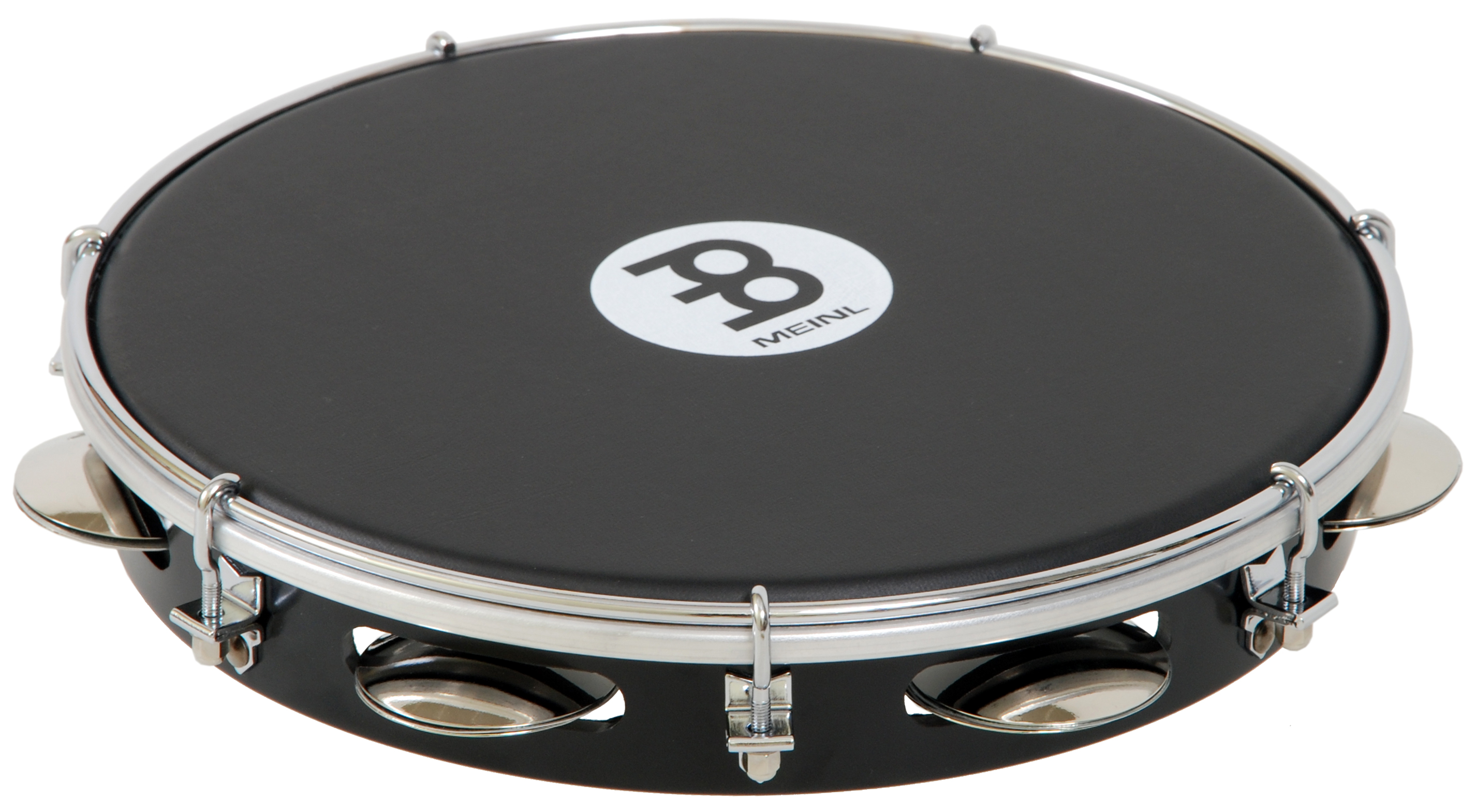 Instrument perkusyjny pandeiro PA10ABS-BK-NH firmy Meinl